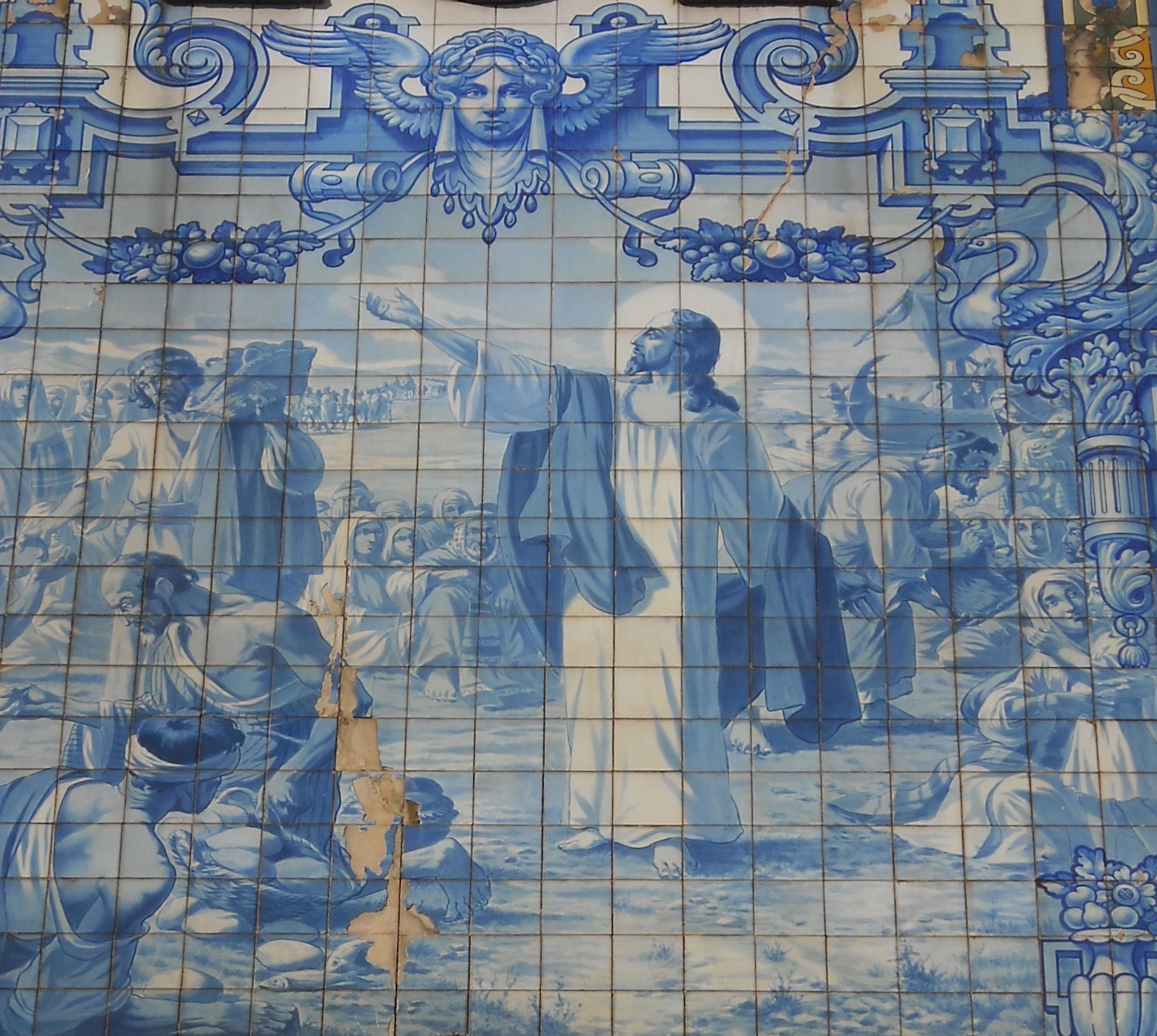 Jesus multiplica os pães. Azulejo da Igreja de Santa Efigênia, na cidade do Porto em Portugal.